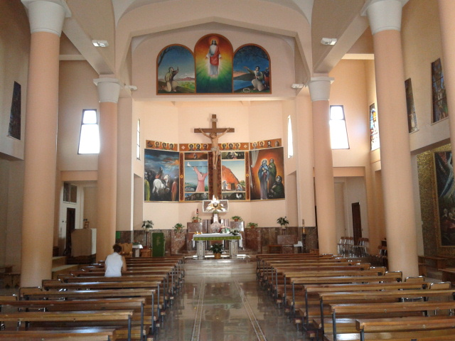 Interno della chiesa della Madonna del Passo